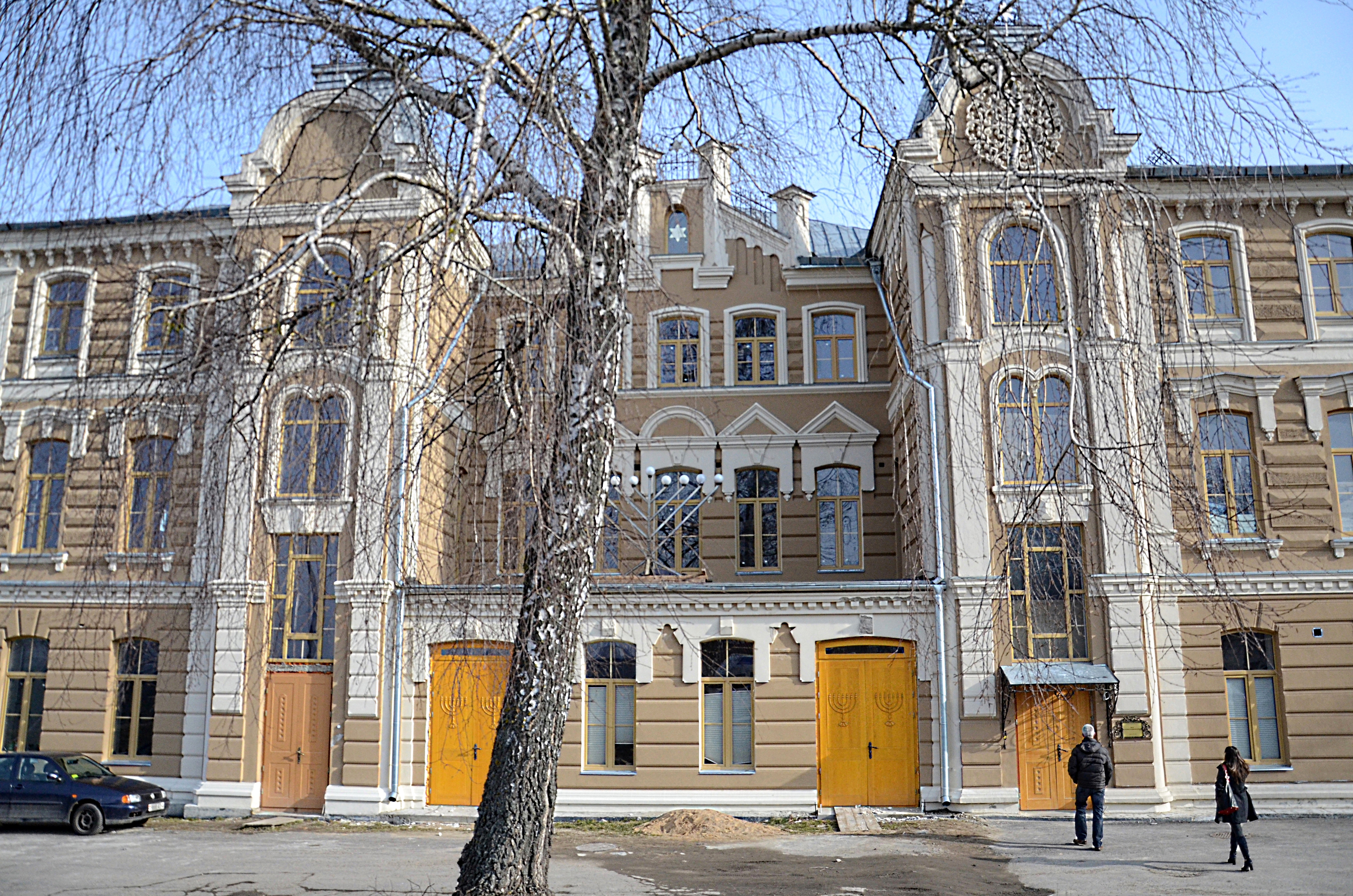 Большая хоральная синагога в Гродно, главный фасад.